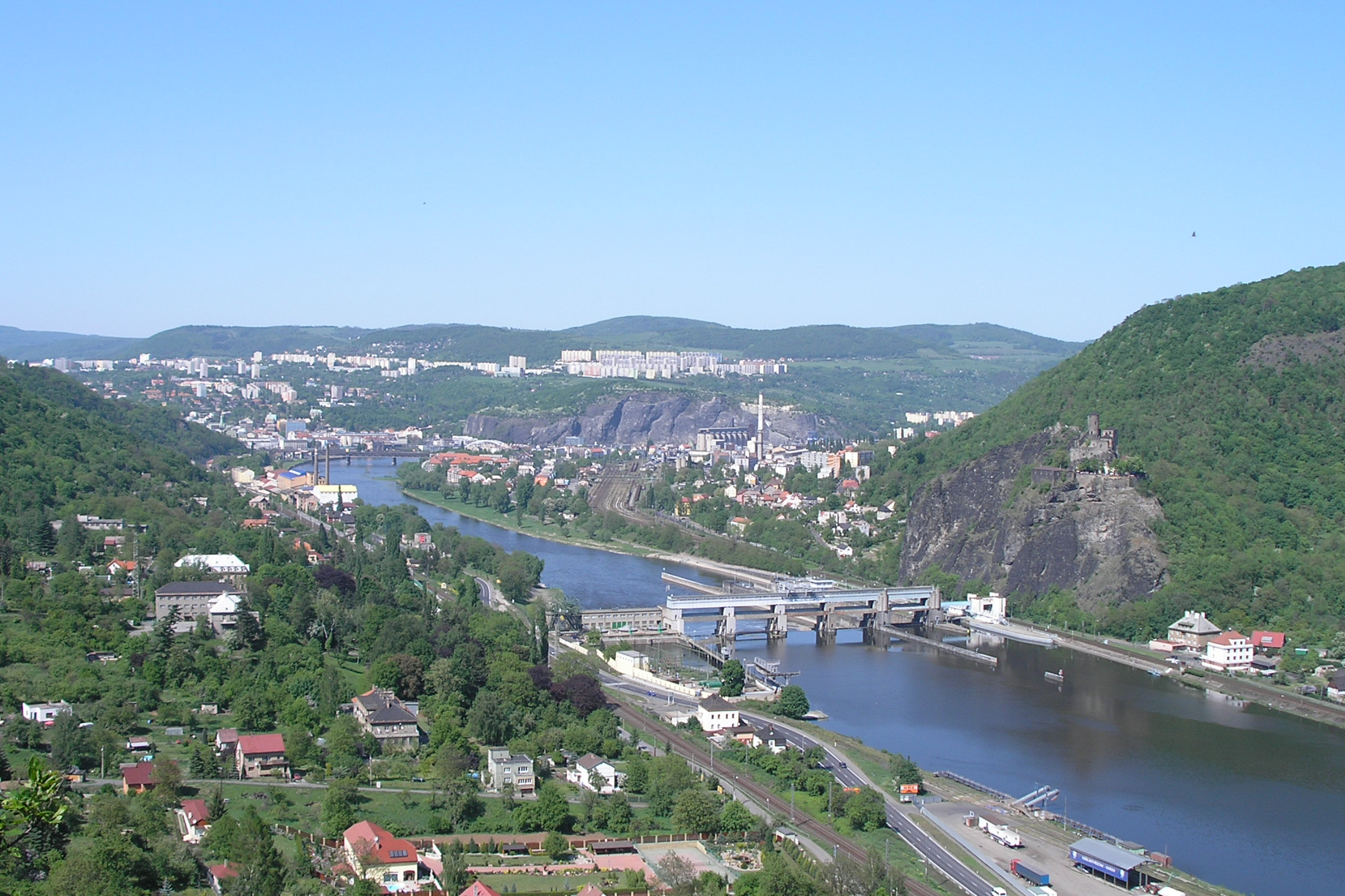 Pohled z vyhlídky na Vaňovské skále na Ústí nad Labem